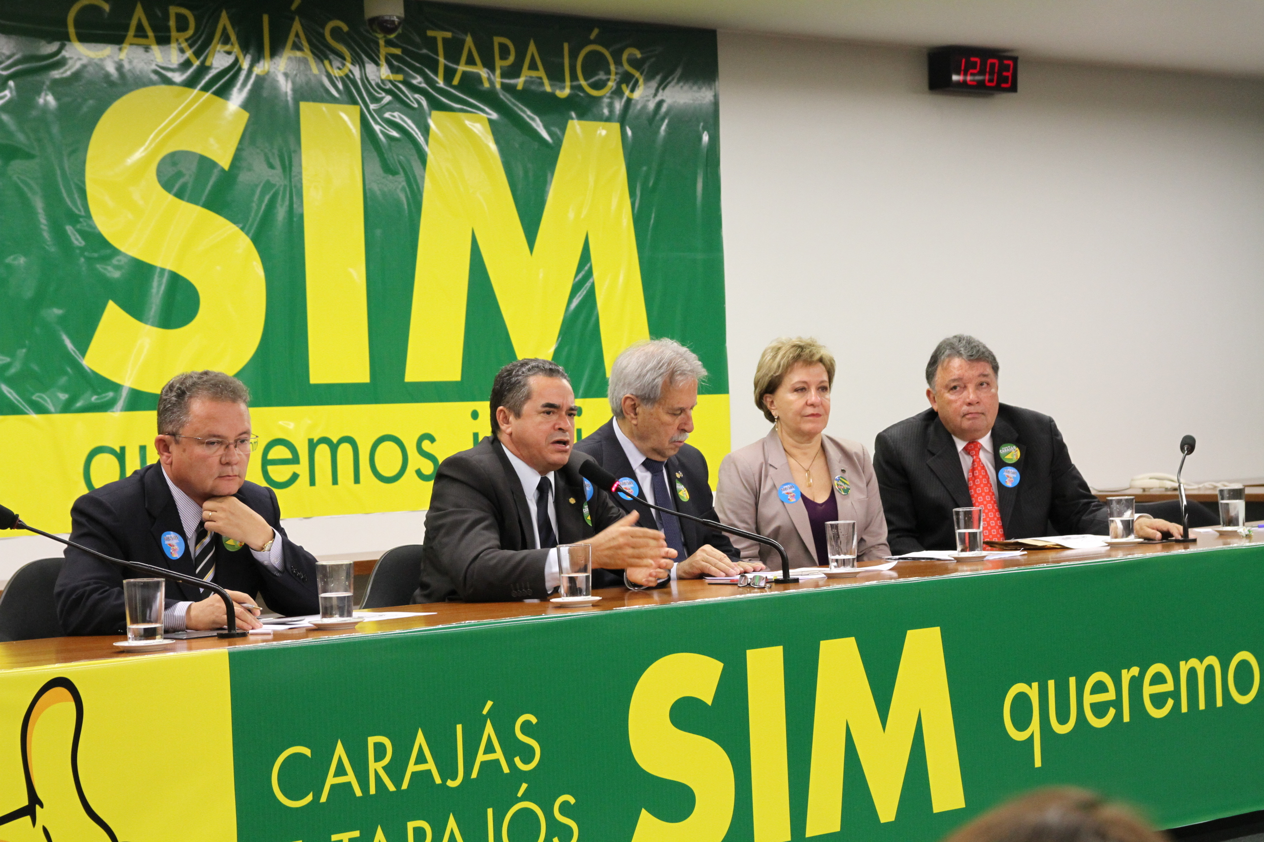 Lançadas na Câmara as Frentes Parlamentares em defesa dos estados do Tapajós e Carajás. O plebiscito para a divisão do Pará foi realizado no dia 11 de dezembro.